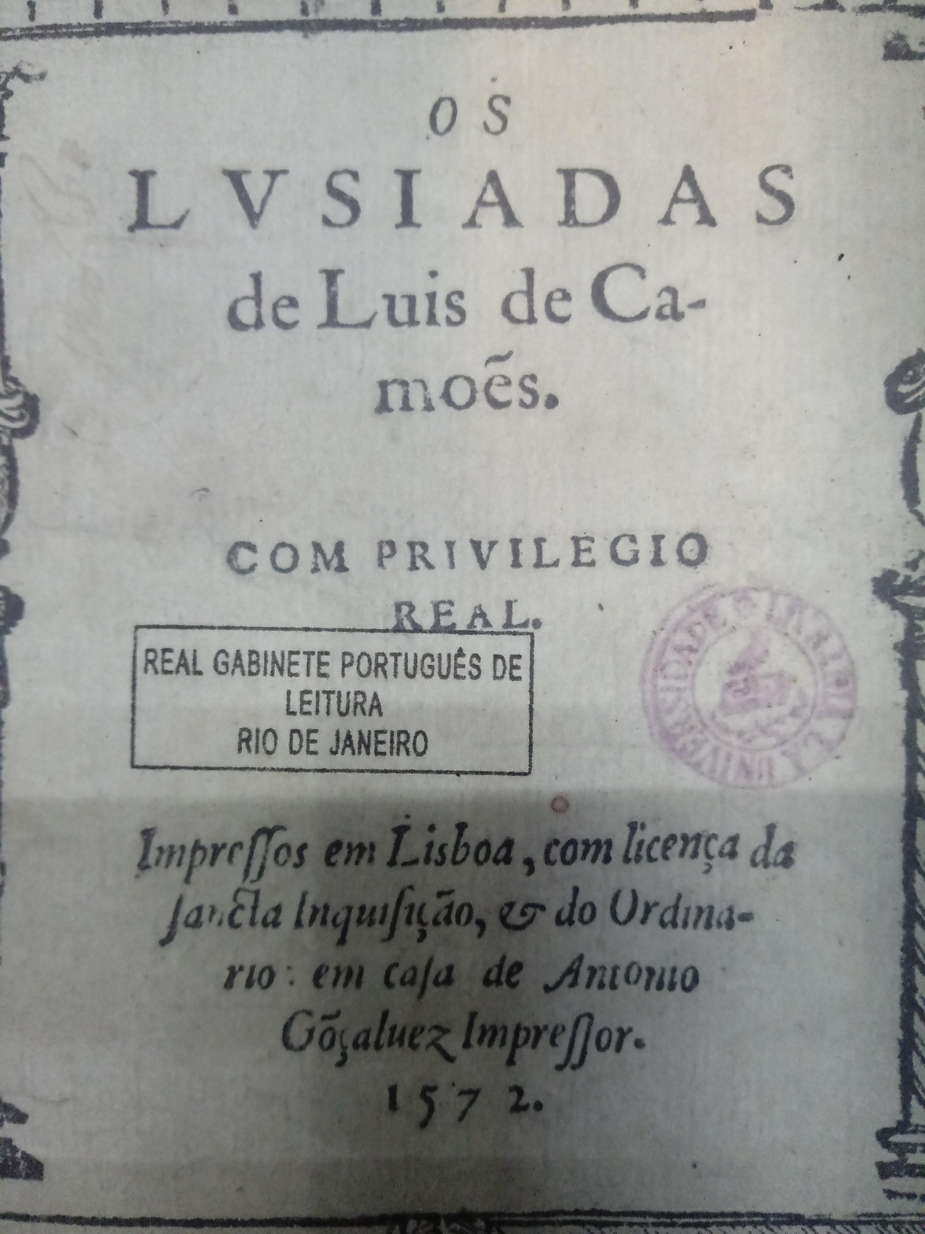 Exemplar de Os Lusíadas no Real Gabinete Portugues de Leitura - Rio de Janeiro